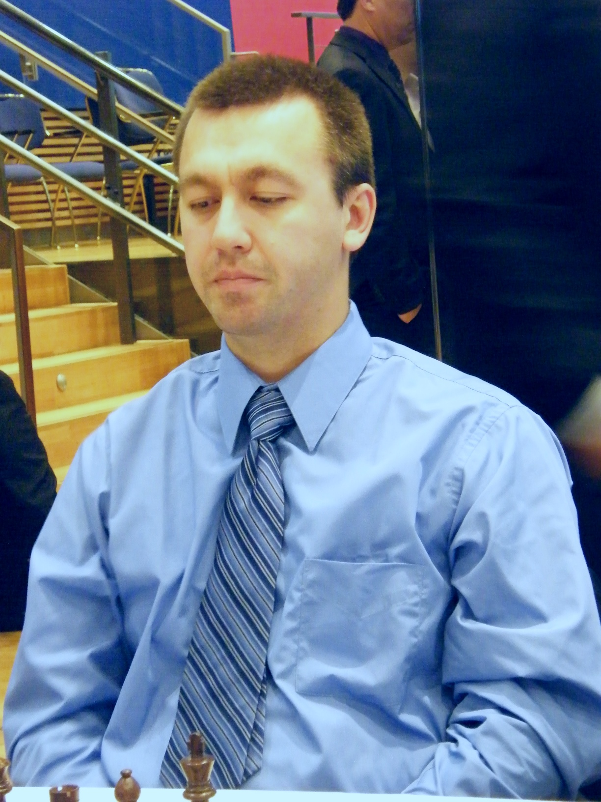 Gata Kamski bei der 38. Schacholympiade in Dresden 2008